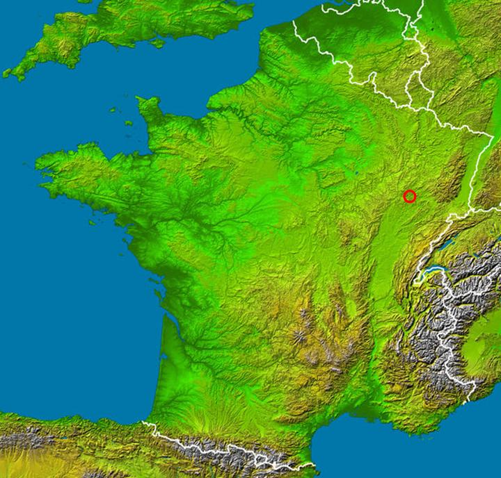 Localisation du Bassigny